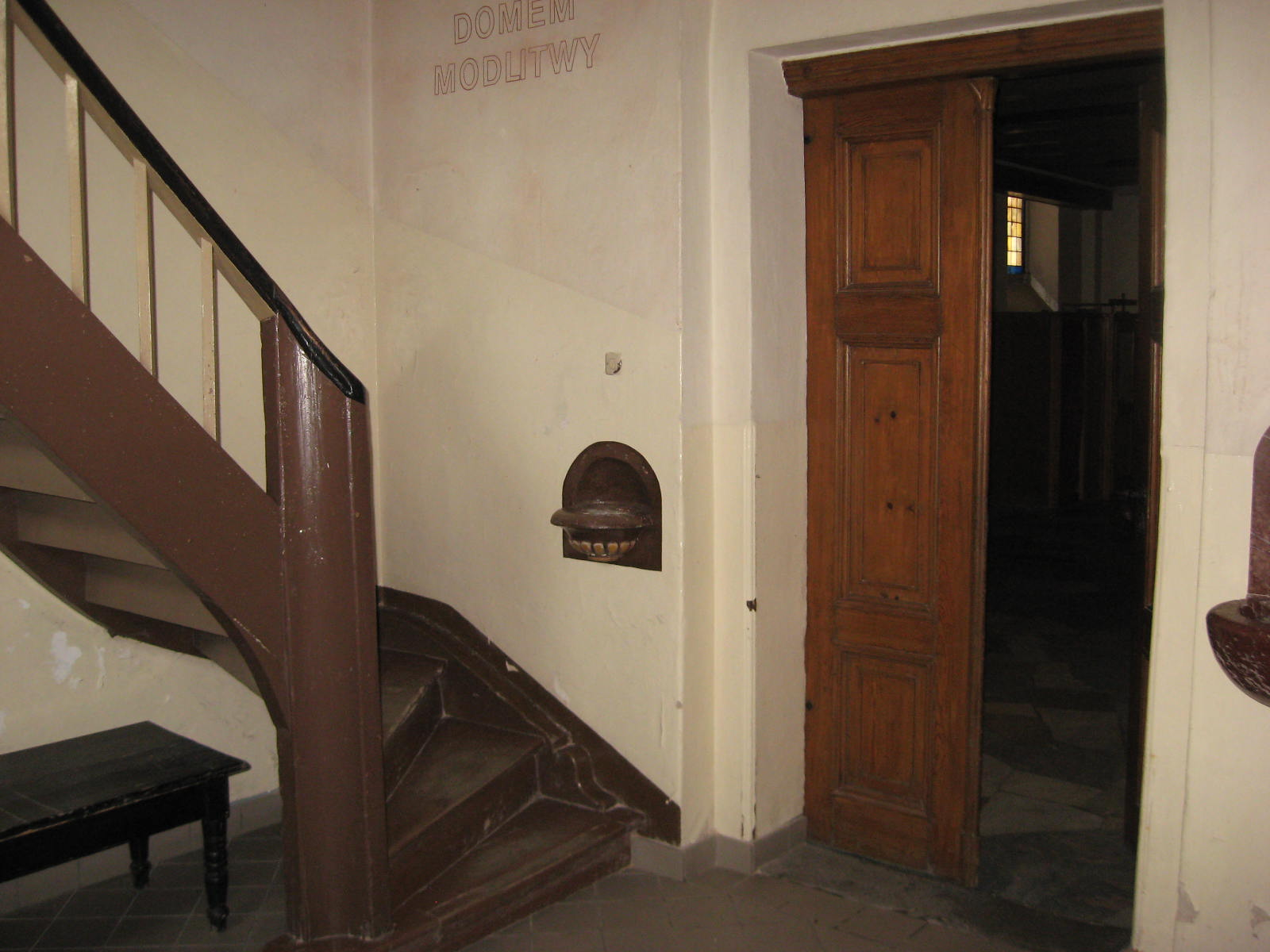 Kruchta